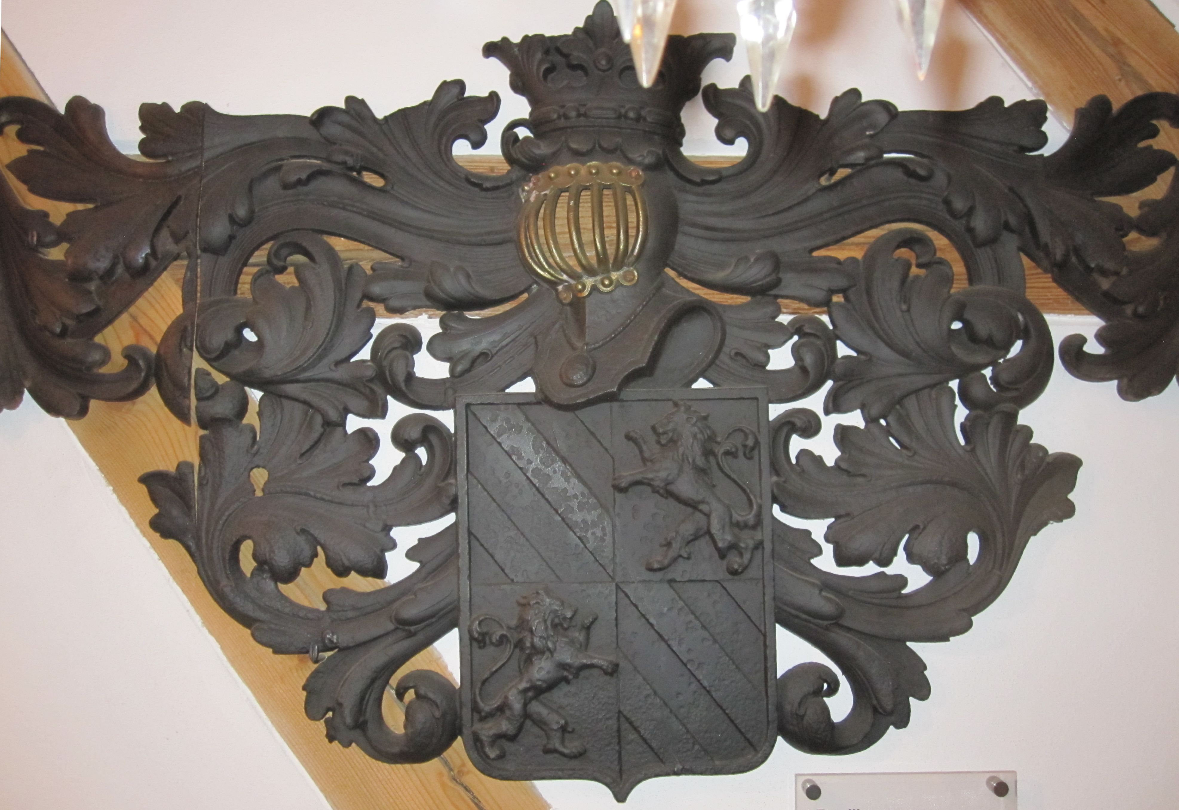 Ein Guss aus der Eisengießerei in Schönheiderhammer, entstanden etwa in der Zeit 2. Hälfte des 19. Jahrhunderts bis Ende des Ersten Weltkrieges. Heute ausgestellt im Bürsten- und Heimatmuseum Schönheide.